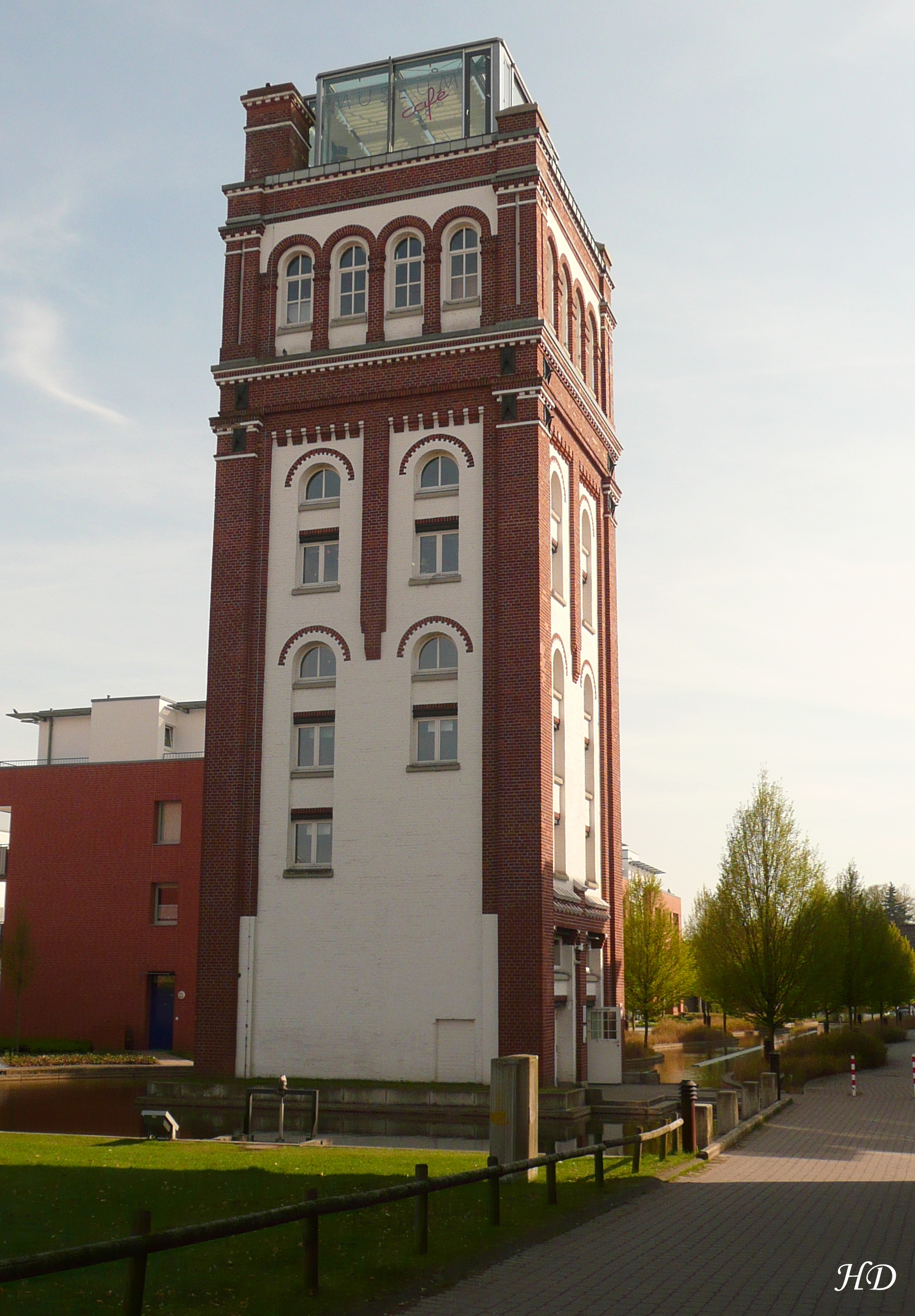 Povelturm